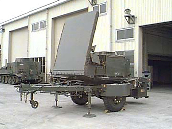 略称：JMPQ-P13 [周波数範囲]Xバンド [指示器]Bスコープ [標定方式]多目標同時標定 [全長]約5,300mm [奥行き]約2,500mm [全高]約3,500mm [重量]約2,900kg [電源] AC115V,10KVA,タービン発動発電機 [操用性]自動標定,遠隔操作 [製作]東芝 本装置は、短射程、低初速の迫撃砲を標定するために使用する。72式対迫レーダ装置JAN/MPQ-N1の後継機として、61年度より装備化されている。次の特徴がある。（1）遠距離、至短時間における高精度の敵迫撃砲の位置標定（2）多目標の同時標定（3）全天候性、機動性を有する